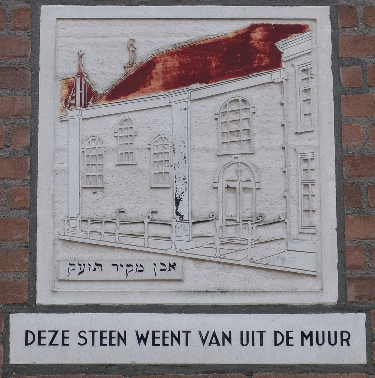 Twee stenen die tezamen een gedenksteen vormen, ter nagedachtenis aan de synagoge die op deze plek heeft gestaan. De synagoge is gebouwd in 1780 en afgebroken in 1953. Ontworpen door Peter de Rijcke en gemaakt door Frits Vogelpoel. De steen toont de synagoge, in het Hebreeuws staat 'Deze steen weent van uit de muur', het zijn woorden afkomstig uit de Torah (tevens in Habakuk 2:11). De steen is op 30 mei 1979 onthuld door een van de leden van de Joodse gemeenschap.